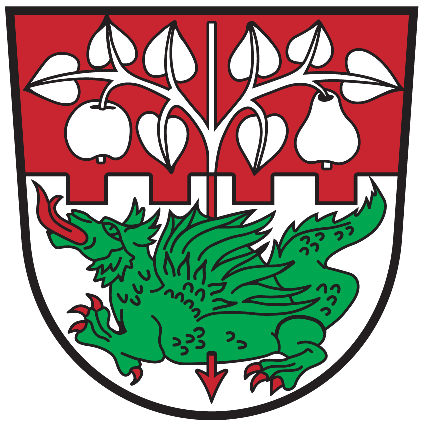 Wappen von St. Georgen im Lavanttal